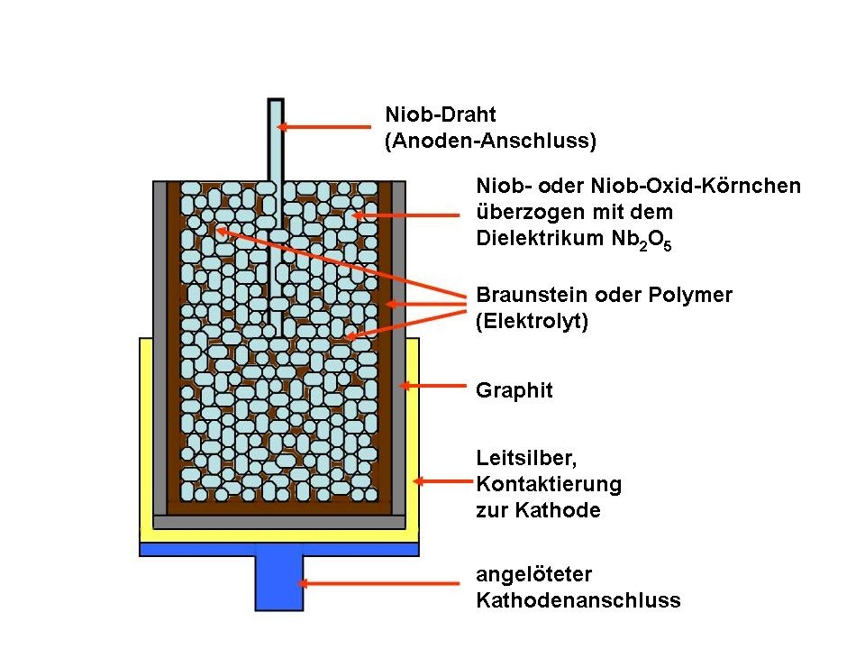 Sinterkörper eines Niob-Elektrolytkondensators mit festem Elektrolyten